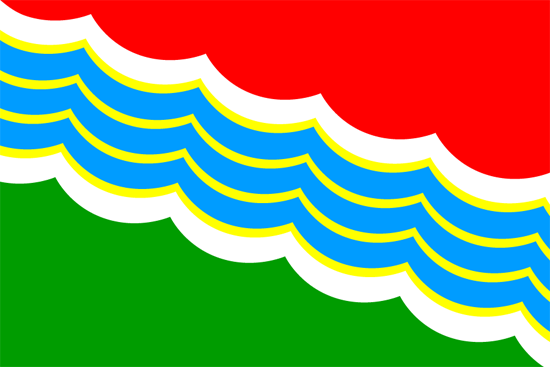 Flagge der Stadt Tiraspol (Transnistrien/Pridnestrowische Moldauische Republik, Pridnestrowien)/Moldawien.